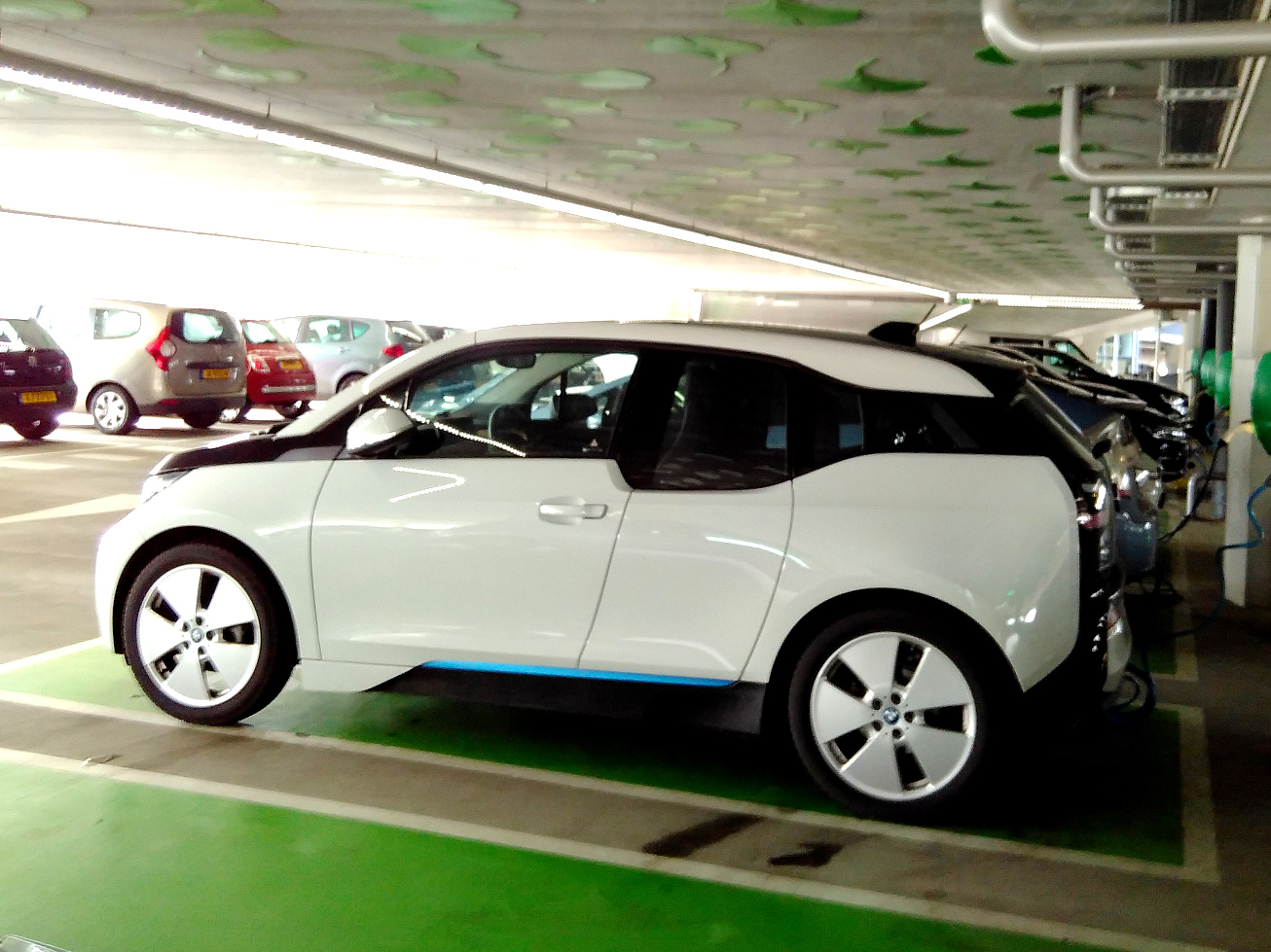 BMW i3 (1 maart 2017)